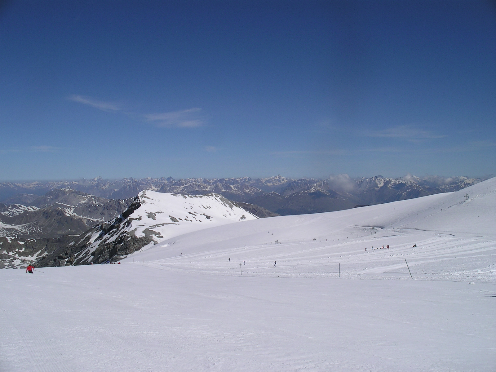 Skirun Cristallo - Passo dello Stelvio